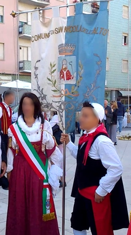 L'abito tradizionale arbëreshë